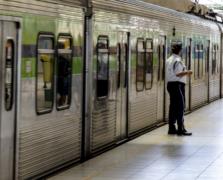 Estação do Metrô do Recife.